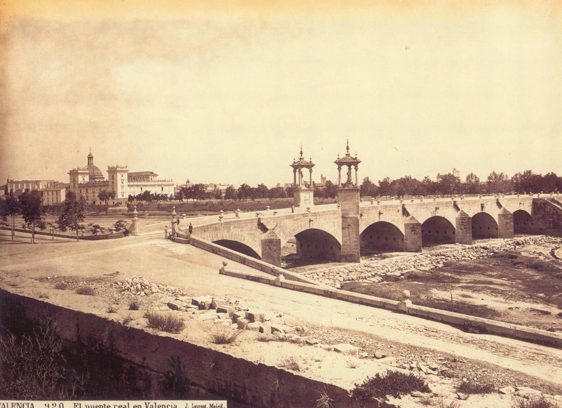 Pont del Real de València, 1870, Jean Laurent Minier (1816 - 1886). Al fons Sant Pius V i en primer pla restes de la muralla.